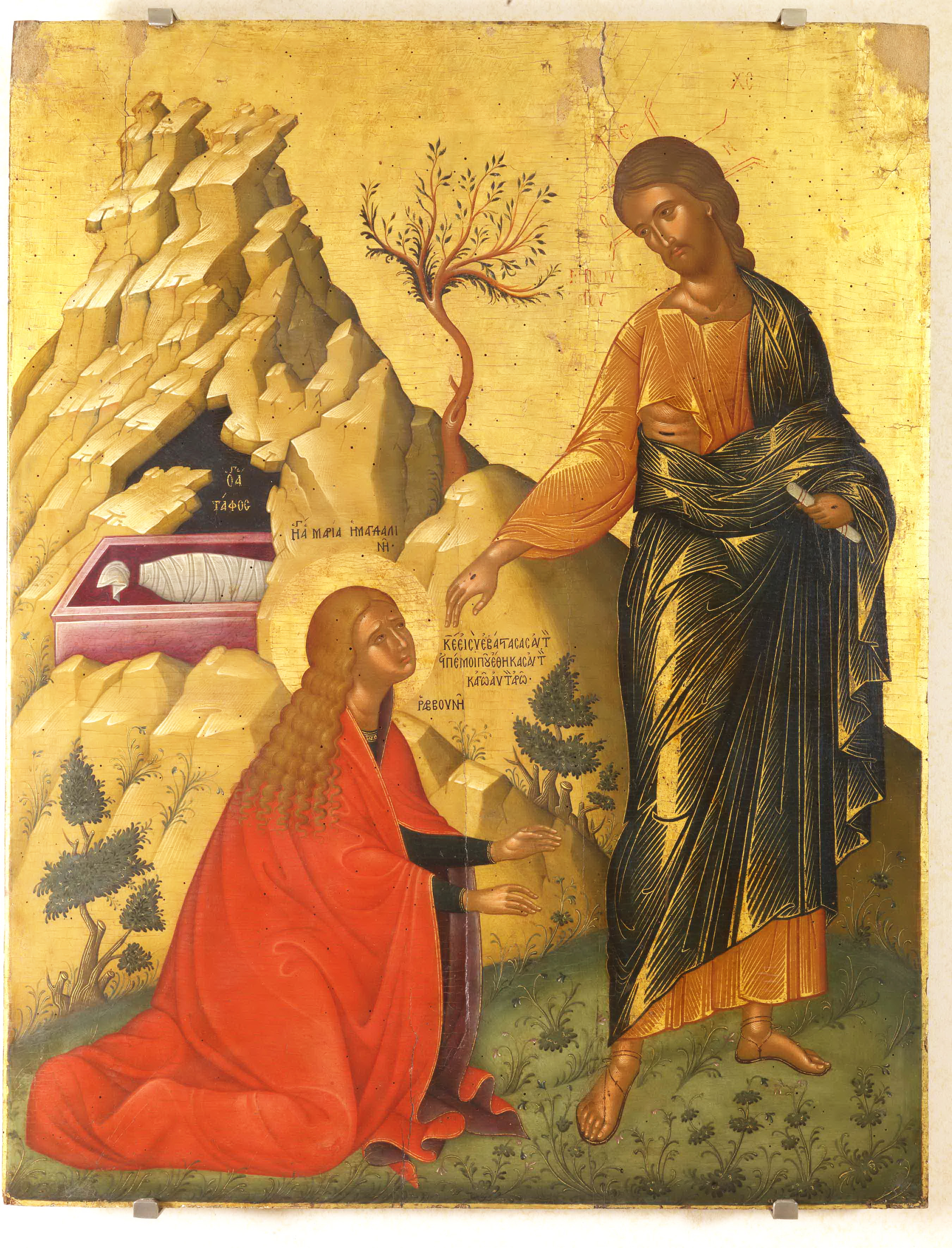 "Do Not Touch Me" (Cretan, 16th c.) Μη μου άπτου γύρω στο 1500, 73x84εκ. άγνωστος Κρητικός ζωγράφος "Ο αγ(ιος) ΤΑΦΟC, Η ΑΓΙΑ ΜΑΡΙΑ ΜΑΓΔΑΛΙΝΗ, Κ(ύρι)Ε ΕΙ ΣΥ ΕΒΑΣΤΑΣΑΣ ΑΥΤΟΝ, ΕΙΠΕ ΜΟΙ ΠΟΥ ΕΘΗΚΑΣ ΑΥΤΟΝ ΚΑΓΩ ΑΥΤΟΝ ΑΡΩ και ΡΑΒΒΟΥΝΗ" Στην εικόνα παριστάνεται η εμφάνιση του Χριστού στη Μαγδαληνή, σύμφωνα με το ευαγγέλιο του Ιωάννη (Ιω. 20, 15-17). Ο αναστημένος Χριστός, με εμφανείς τις πληγές στην πλευρά, τα πόδια και τα χέρια του, στρέφεται προς τη Μαρία Μαγδαληνή που είναι γονατισμένη και της απαγορεύει να τον αγγίξει. Δίπλα στη Μαγδαληνή αναγράφονται τα λόγια που απηύθυνε στον Χριστό νομίζοντας ότι είναι ο κηπουρός που είχε μεταφέρει το σώμα του Κυρίου σε άλλη θέση. Ο κήπος στον οποίο πραγματοποιείται η συνάντηση αποδίδεται με χαμηλή βλάστηση και μικρά δέντρα, ενώ αριστερά εικονίζεται βράχος με σπήλαιο, όπου υπάρχει η σαρκοφάγος του Χριστού με τα οθόνια και το σουδάριο.